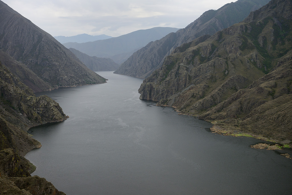 Саяно-Шушенский заповедник, Саянский каньон Енисея. Крутые каменистые и лесные склоны, Фрагменты горных степей.